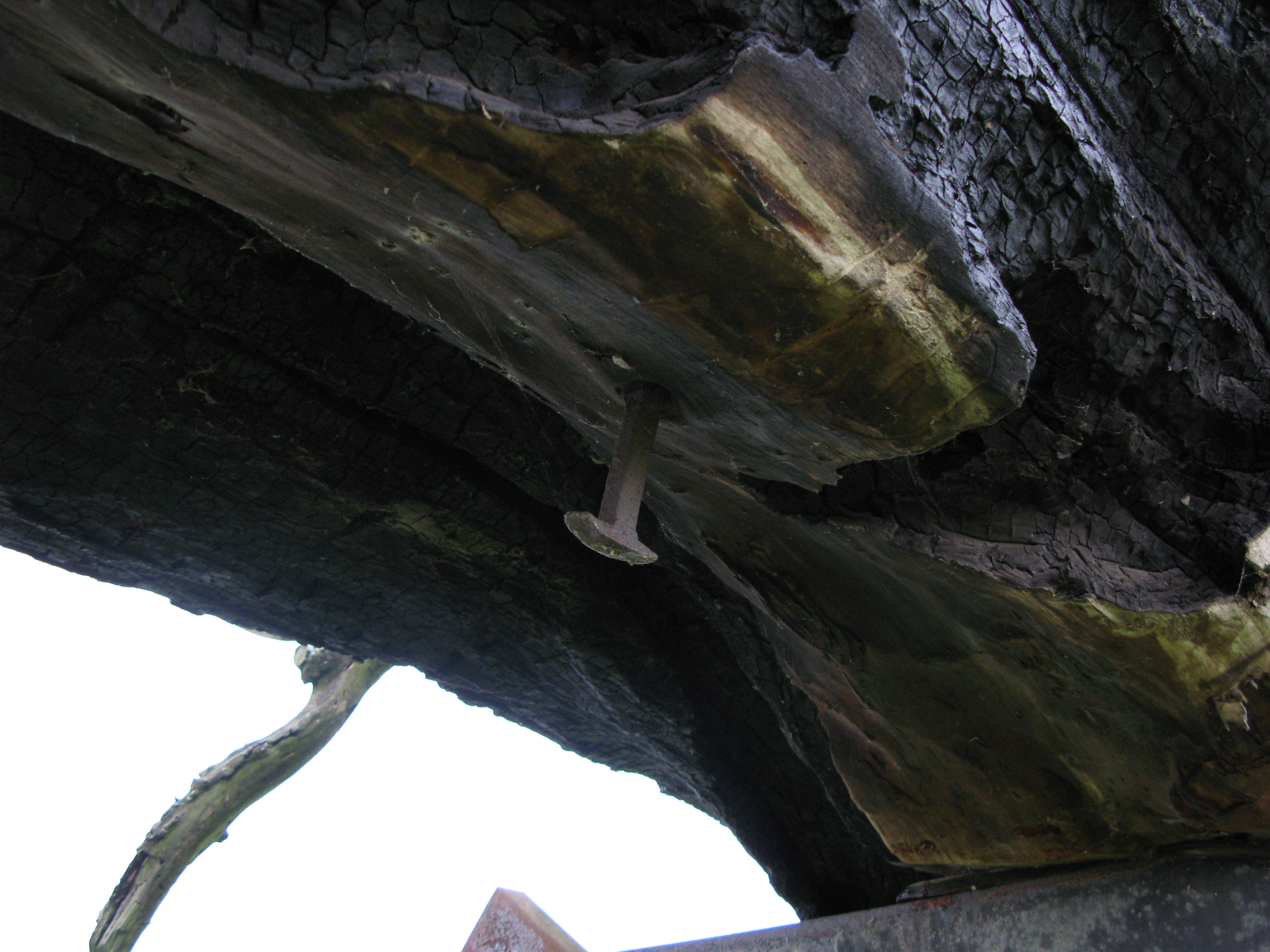 Topola užasa